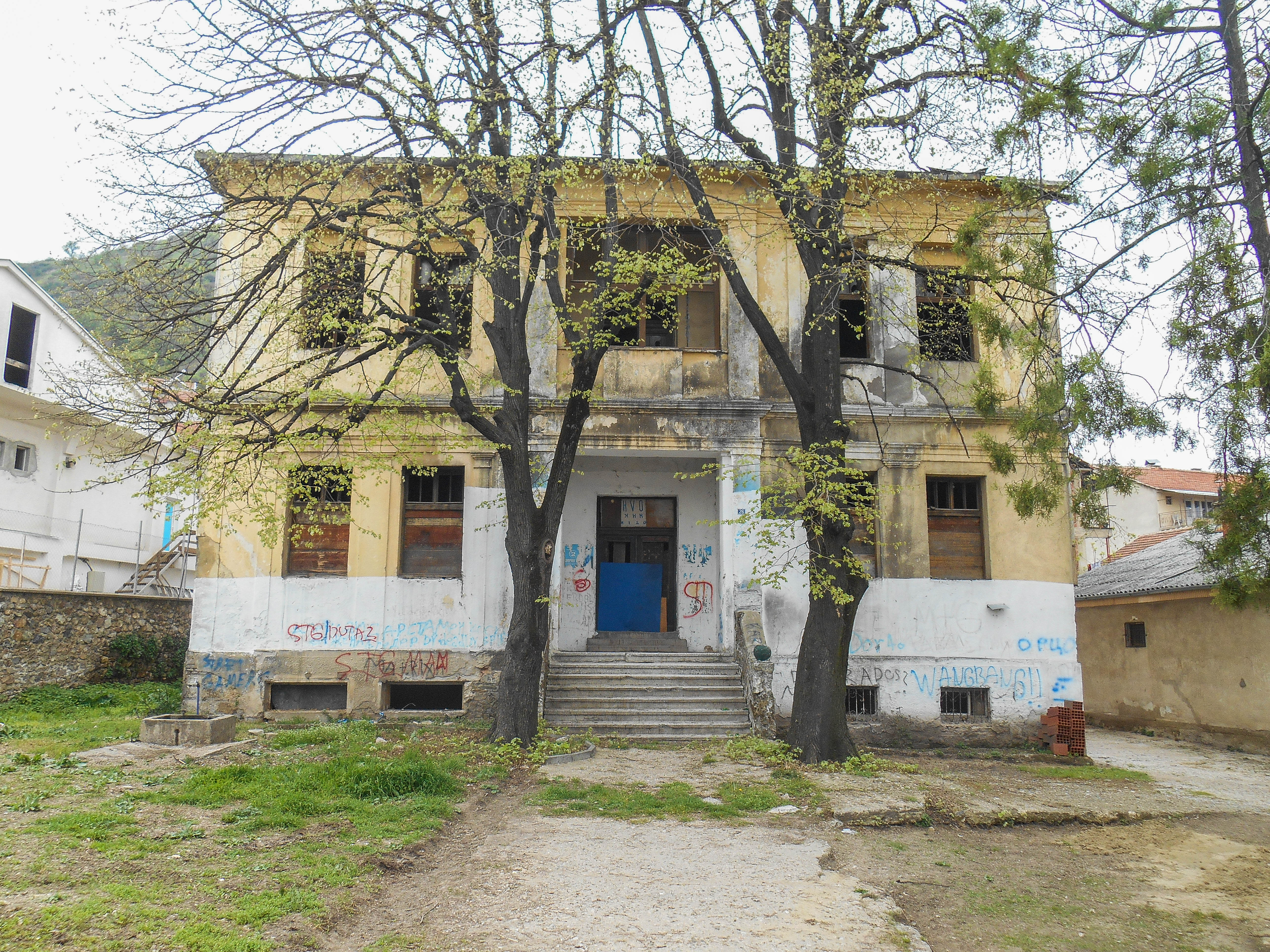 Стариот суд, денеска археолошки локалитет